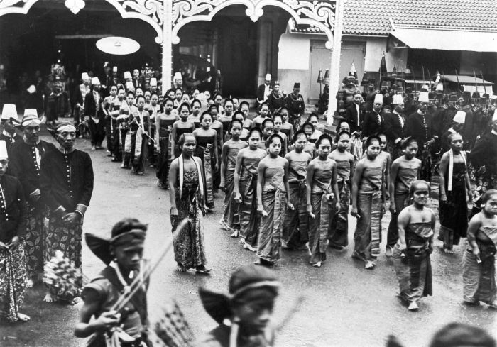 Repronegatief. Het veertig-jarig regeringsjubileum van Soesoehoenan Pakoe Boewono X van Surakarta; in de stoet lopen serimpi's mee